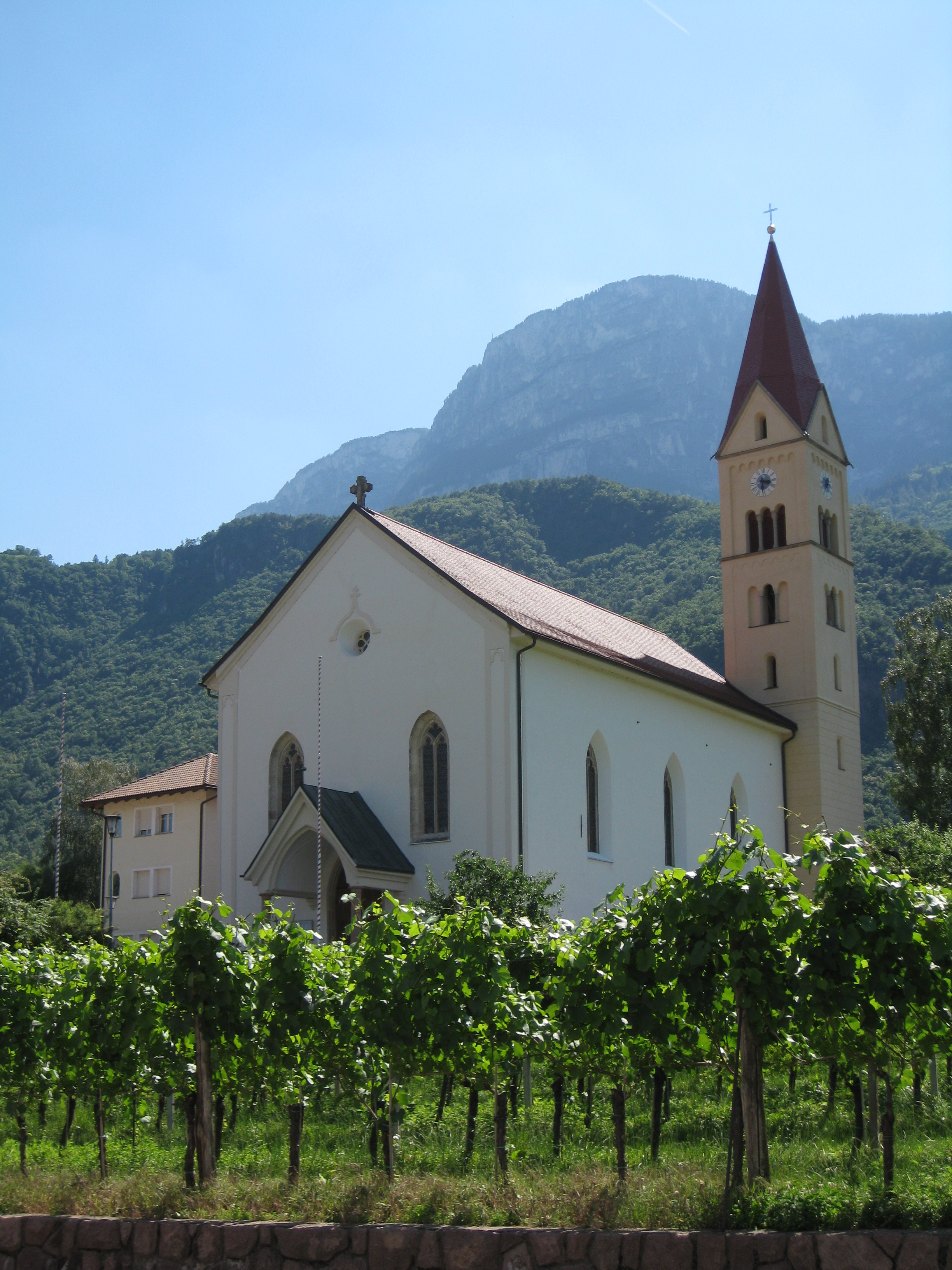 Pfarrkirche St. Valentin in Andrian